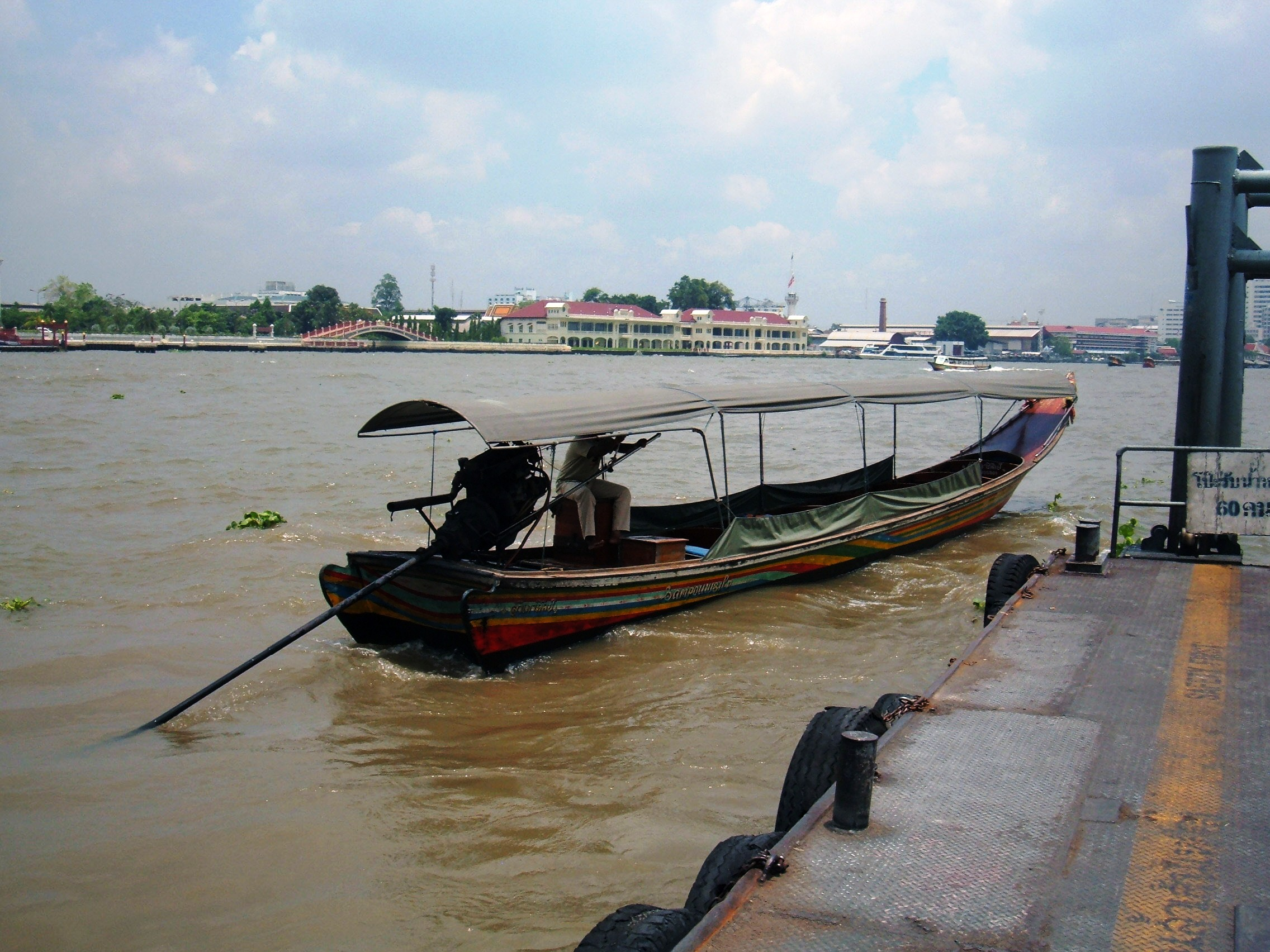 A long-tail boat docking at a pier in Bangkok, Thailand.